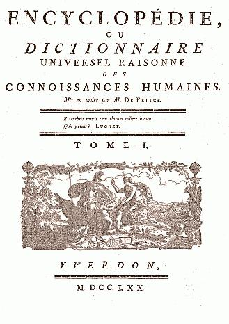 Encylopédie d'Yverdon, Schweiz